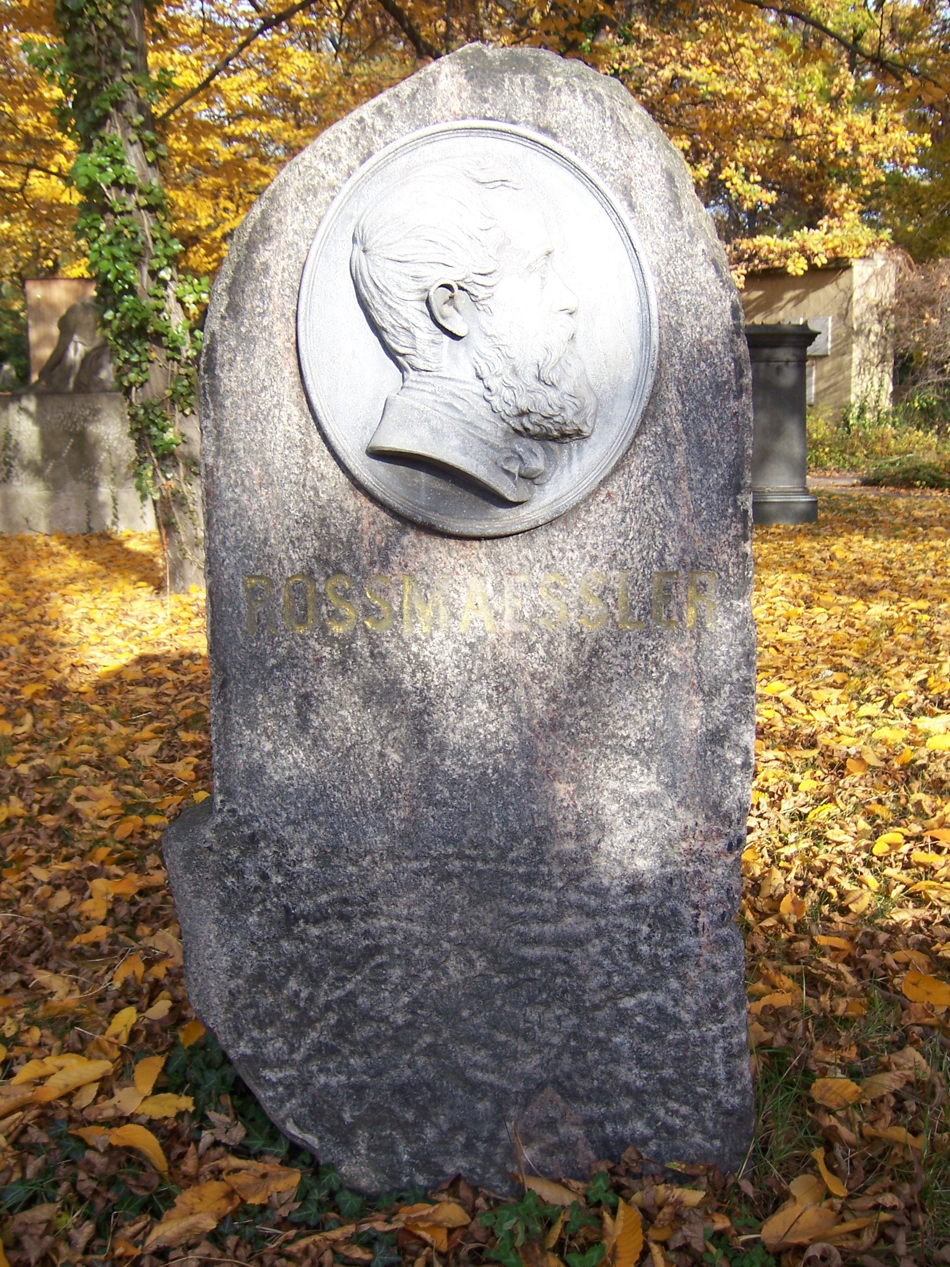 Grabstein Emil Adolf Roßmäßler, ursprünglich: Neuer Johannisfriedhof